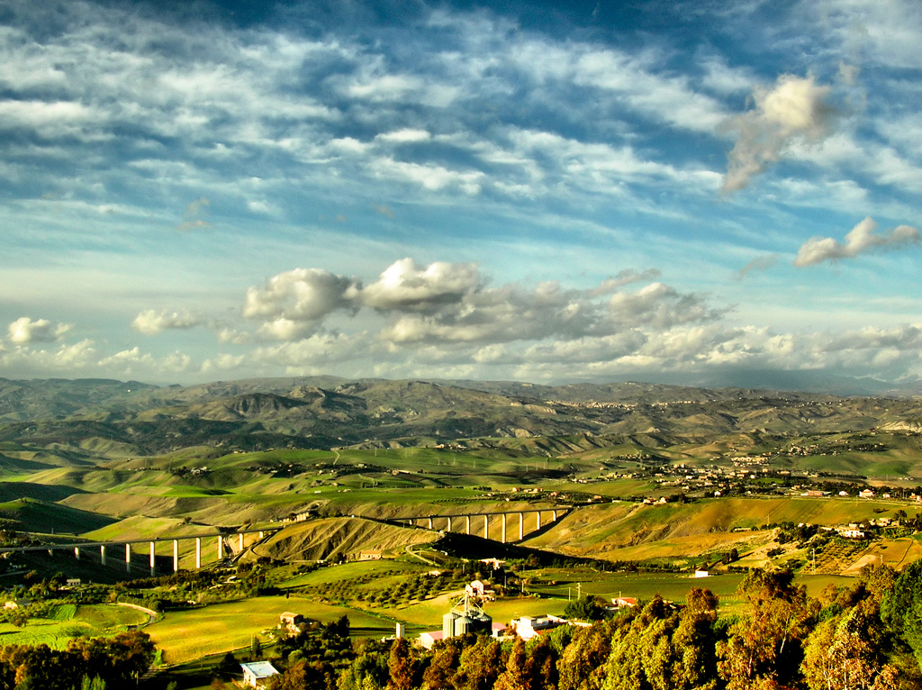 Vista del vallone di Caltanissetta.